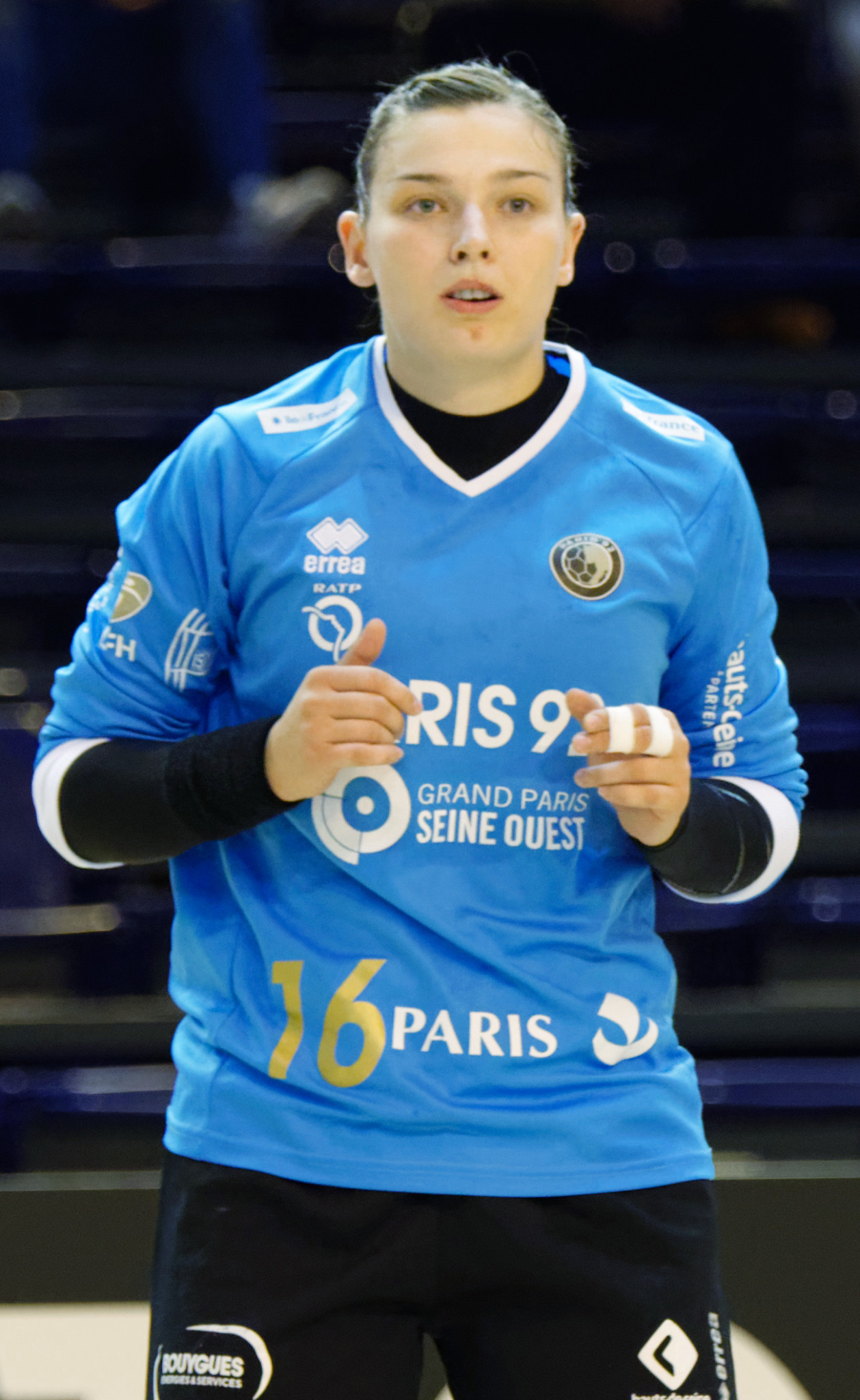 Rencontre de LFH entre Paris 92 et Brest Bretagne Handball. A la Halle Carpentier (Paris), le 05 septembre 2018.